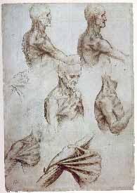 muscules